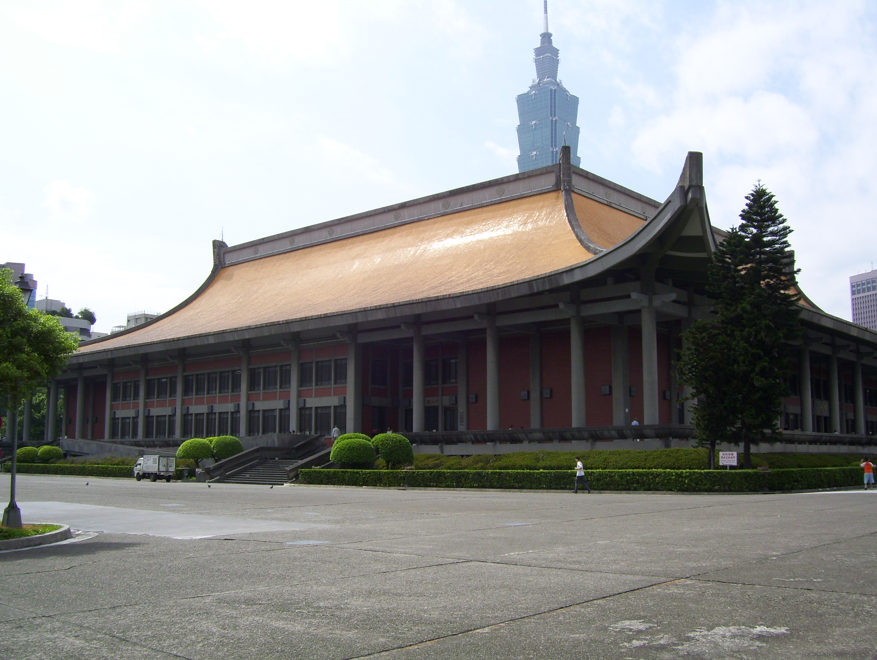 臺北市國立國父紀念館後方。